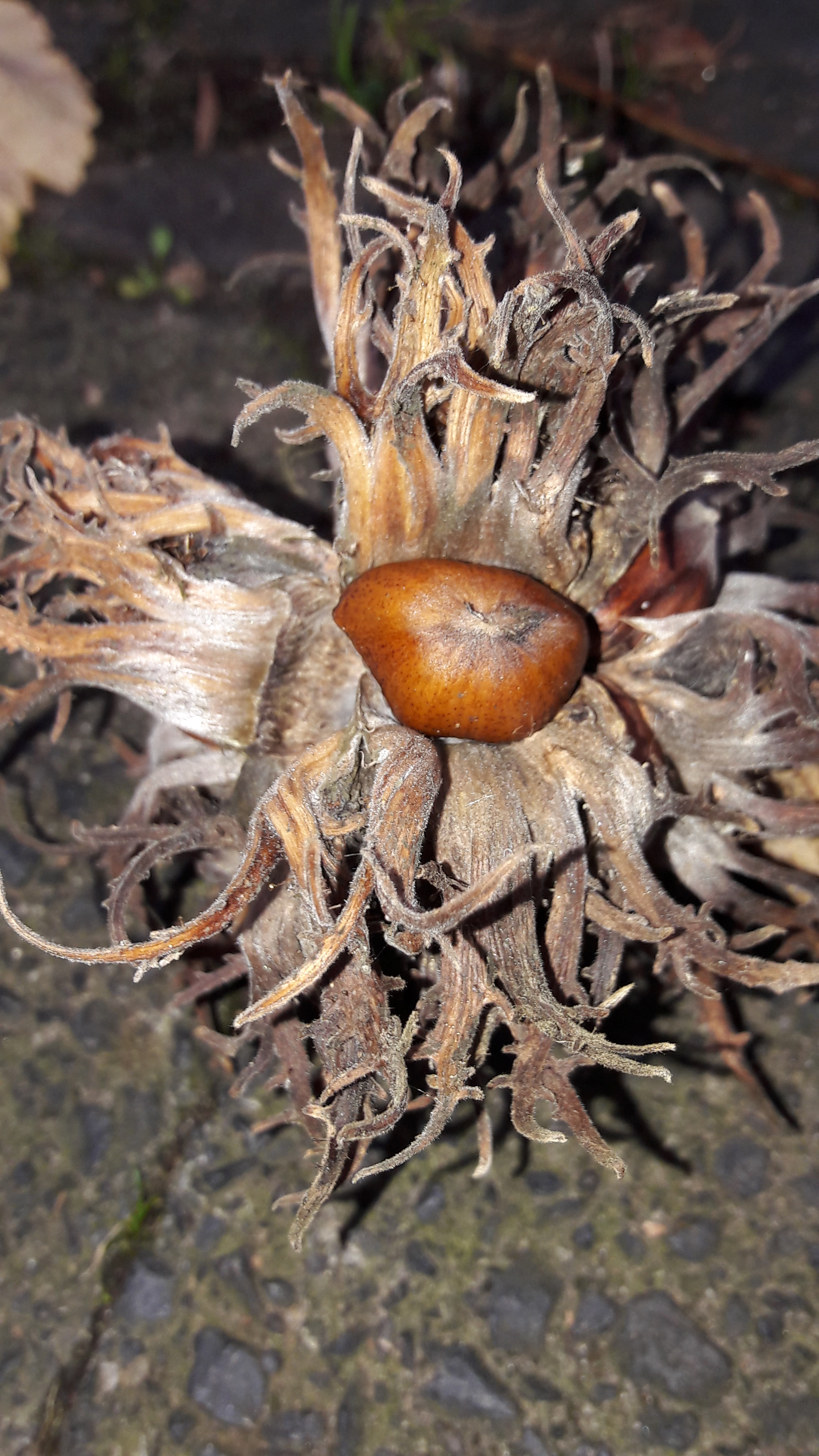 Reifer, vom Baum gefallener Fruchtstand der Baum-Hasel in Bochum, Deutschland.